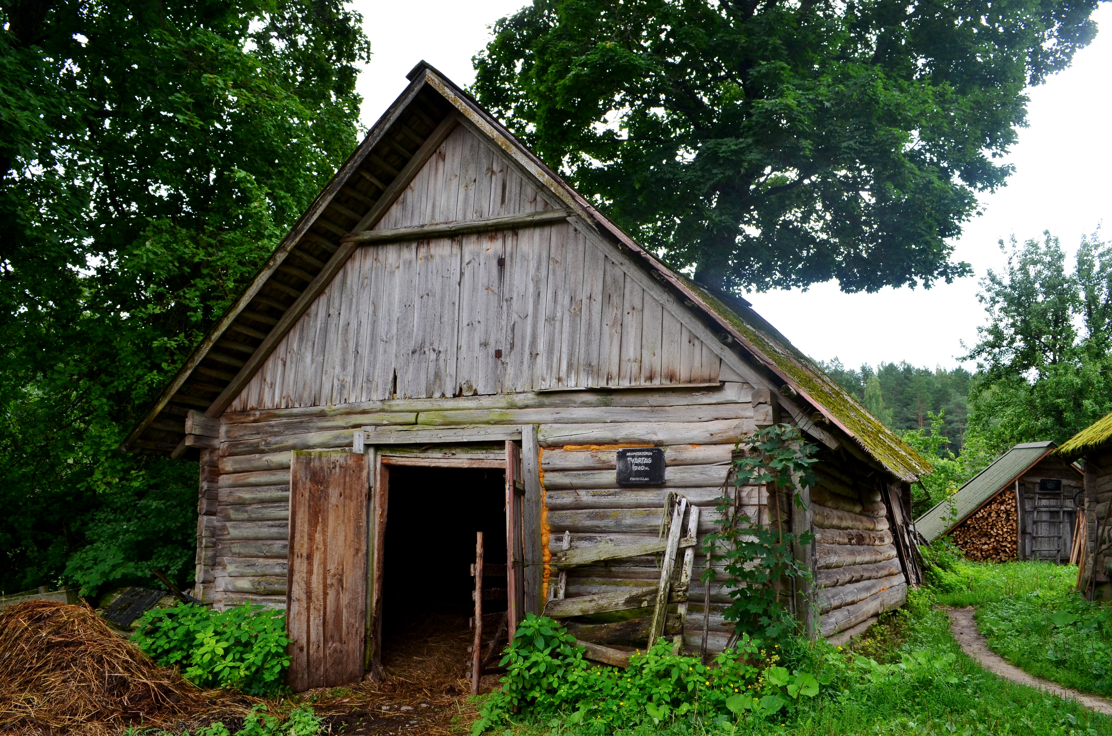 Tvartas, Salų (II) k., Ignalinos raj.